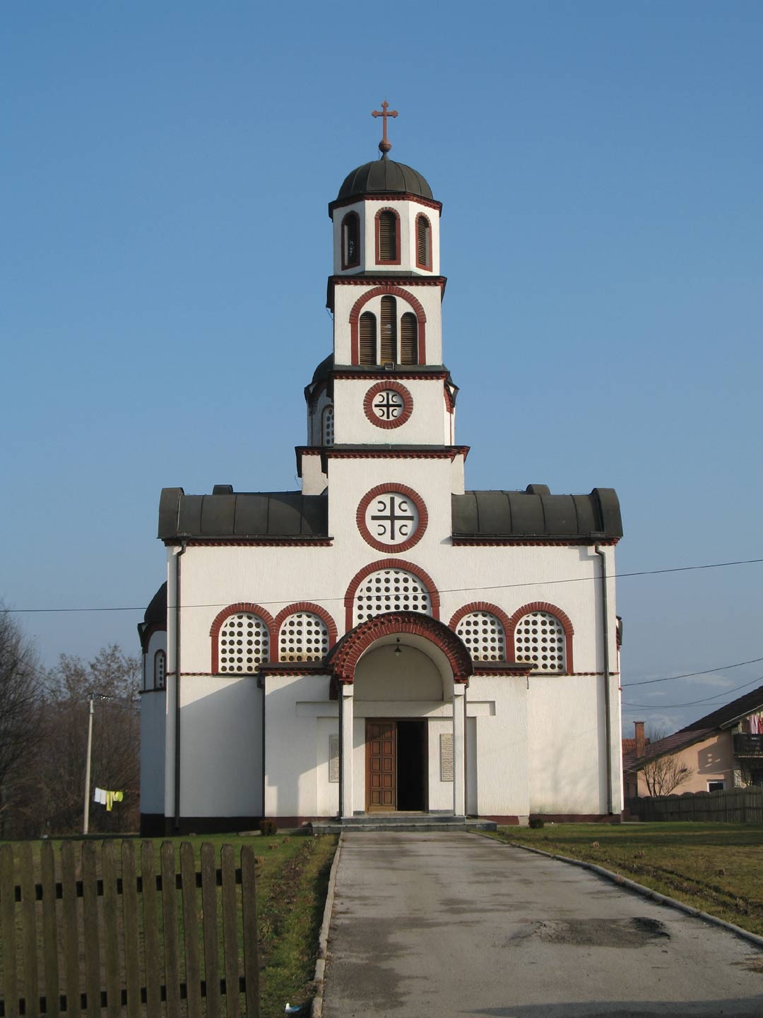 Црква `Свете Тројице` у Какмужу